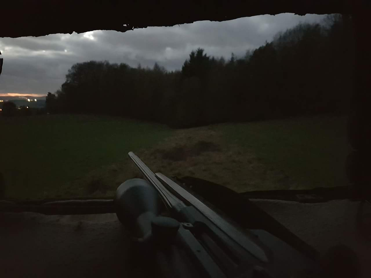 Natur